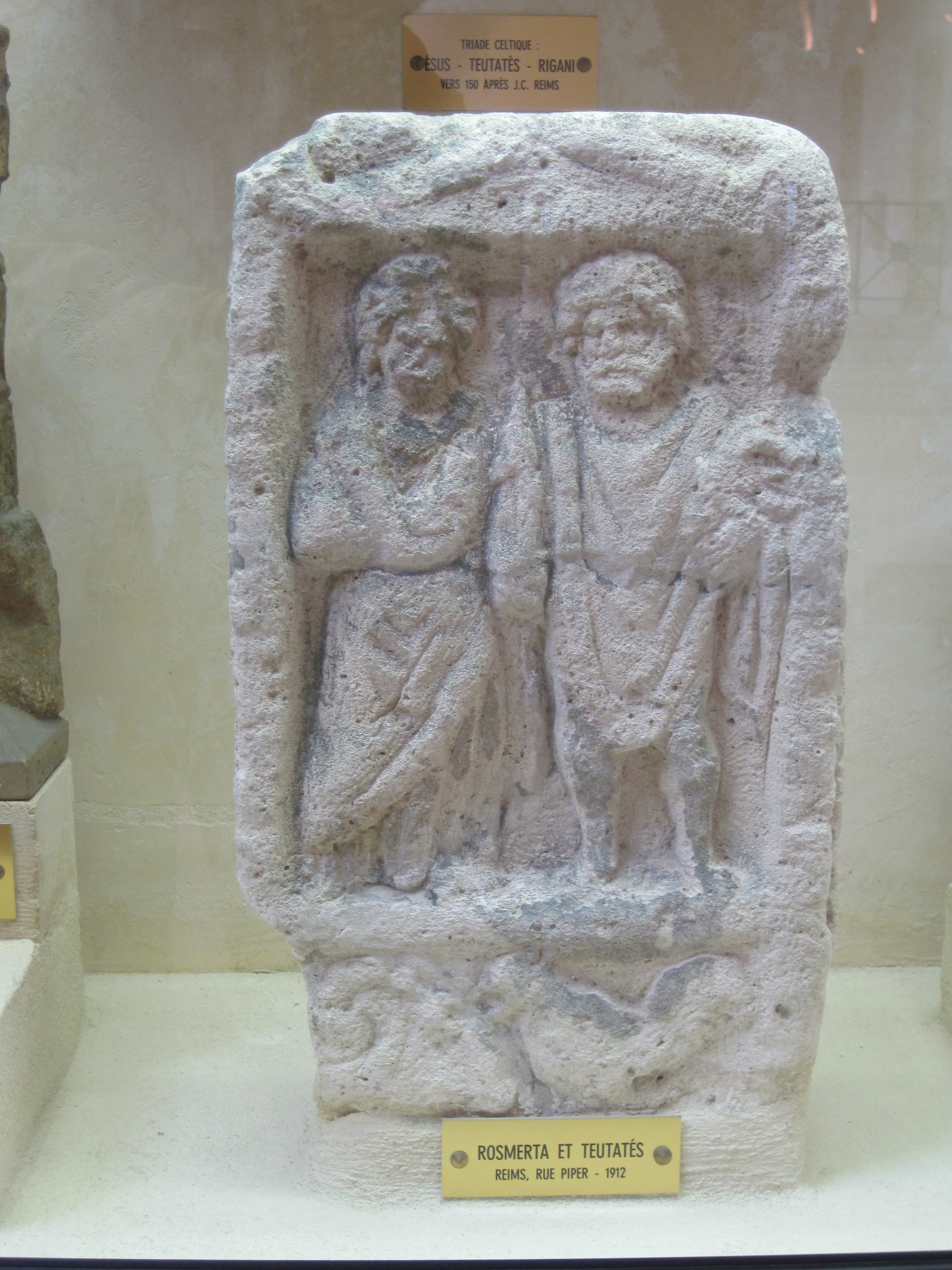 Interlingua: Basse relievo de Mercurio e Rosmerta, divinitates gallic (Reims).